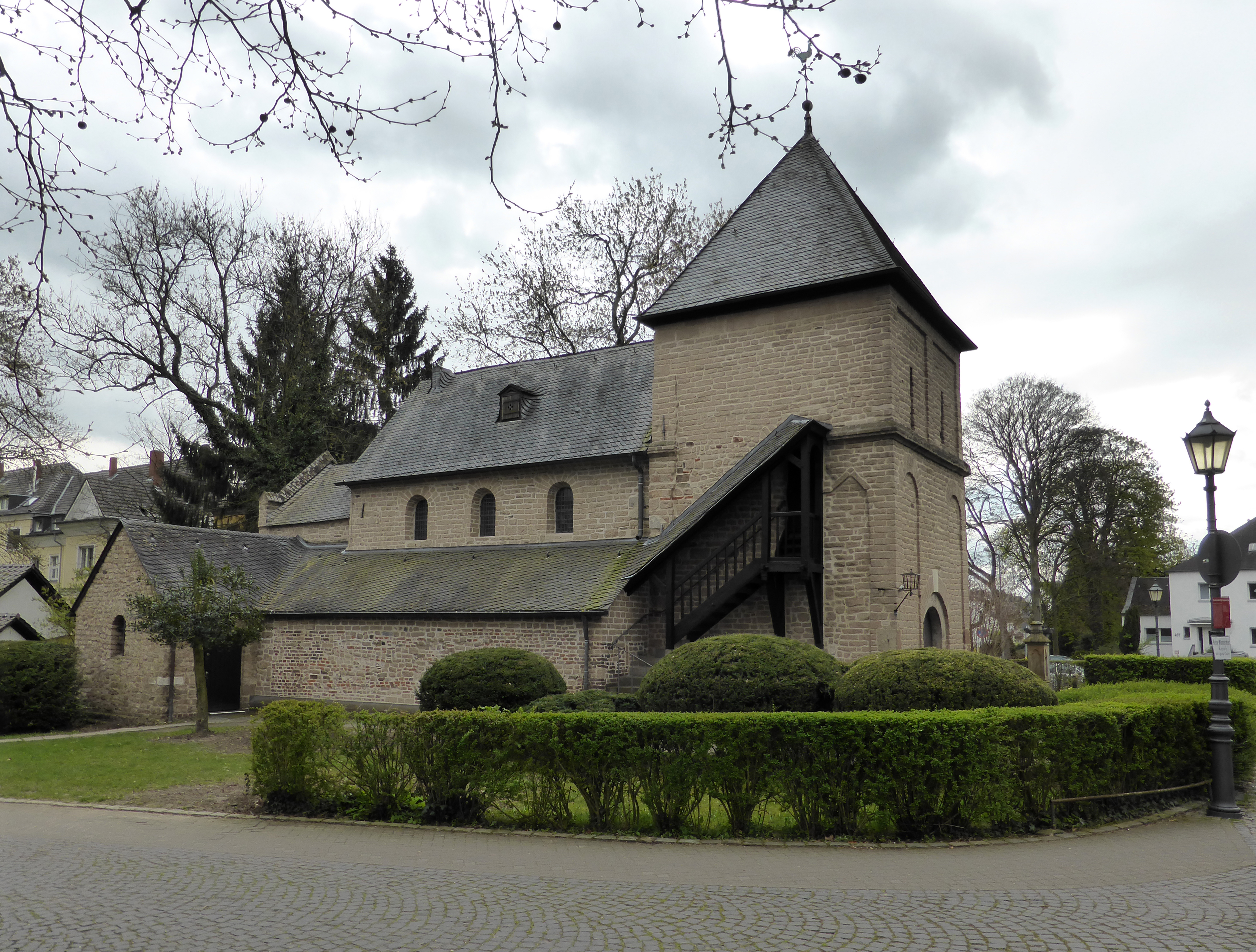 Krieler Dömchen, Köln.